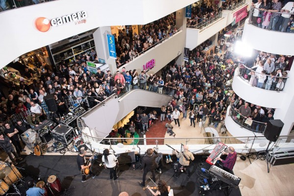 ההופעה של משינה בדיזינגוף סנטר